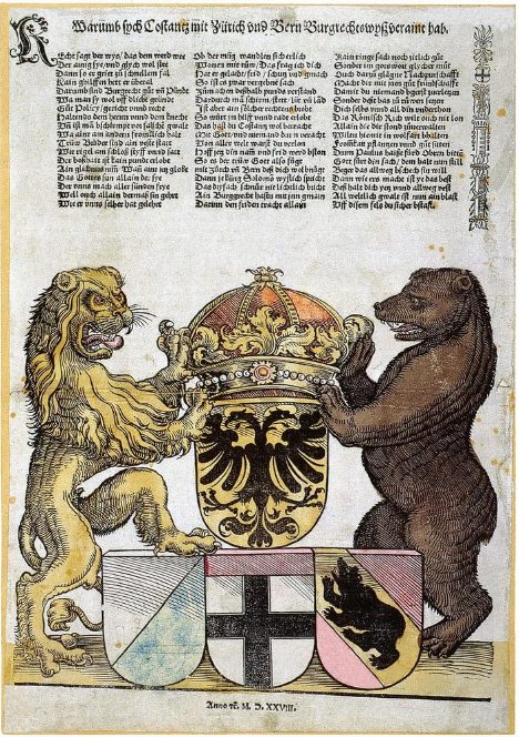 Christliches Burgrecht: Erinnerung an die Bündnisse der Stadt Konstanz mit Zürich (1527) und Bern (1528). Kolorierter Einblattdruck, erschienen 1528 bei Jörg Spitzenberg in Konstanz (Zentralbibliothek Zürich, Graphische Sammlung und Fotoarchiv).